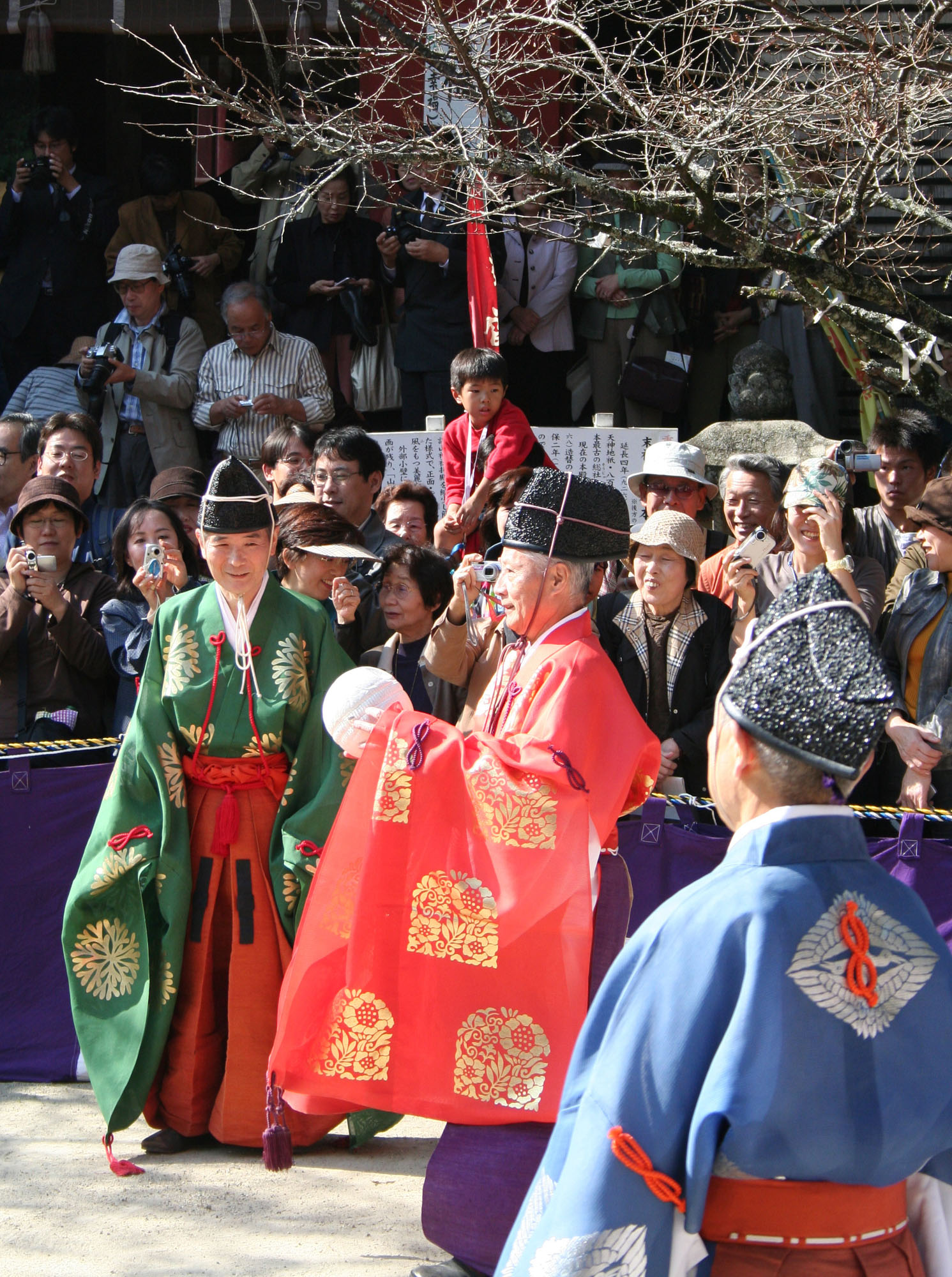 Kemari Matsuri at Tanzan Shrine